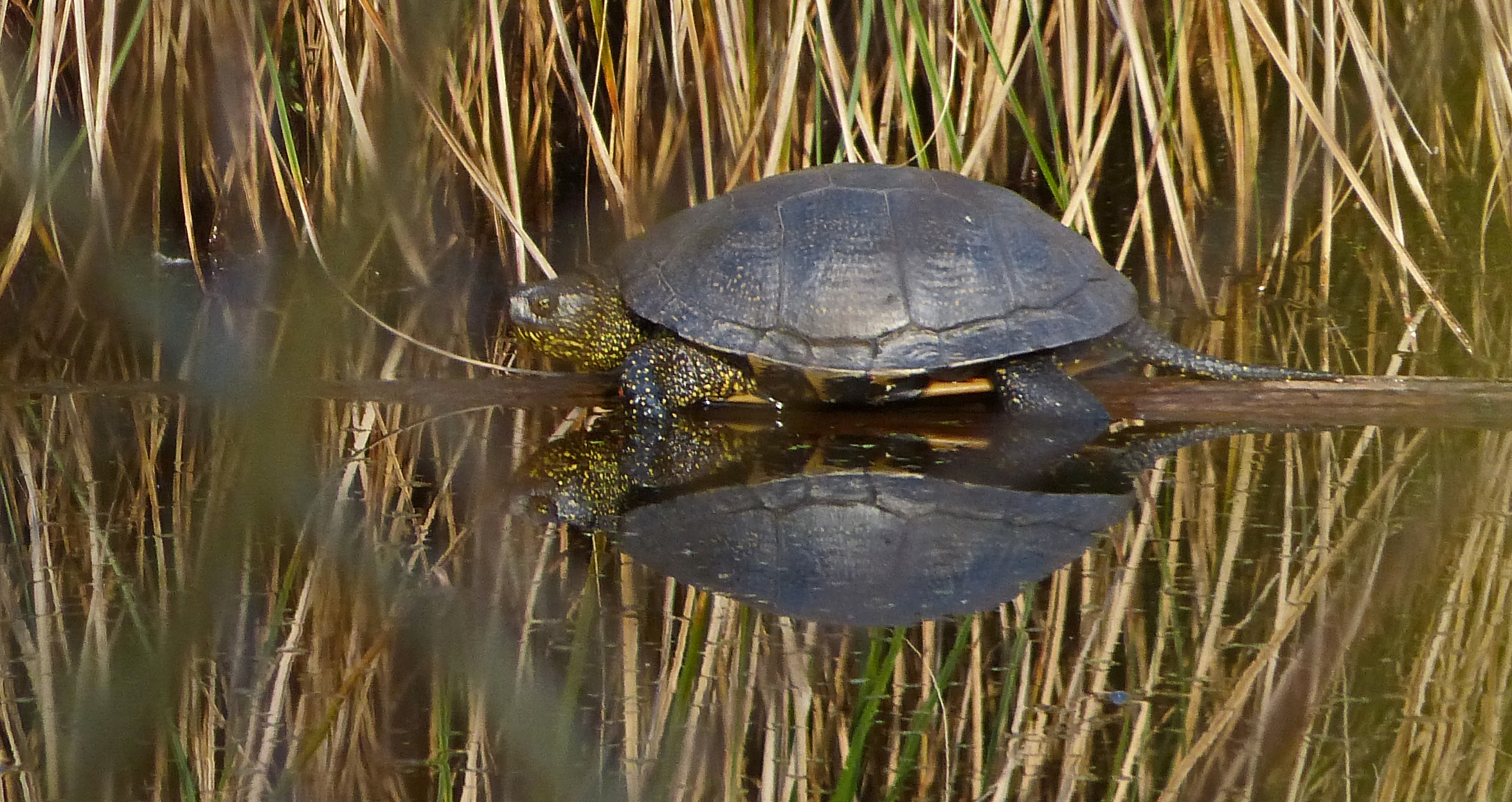 Diese europäische Moorschildkröte (Emys orbicularis) habe ich im Pfrunger-Burgweiler Ried in einem kleinen Teich am Riedlehrpfad bei Wilhelmsdorf entdeckt und fotografiert.